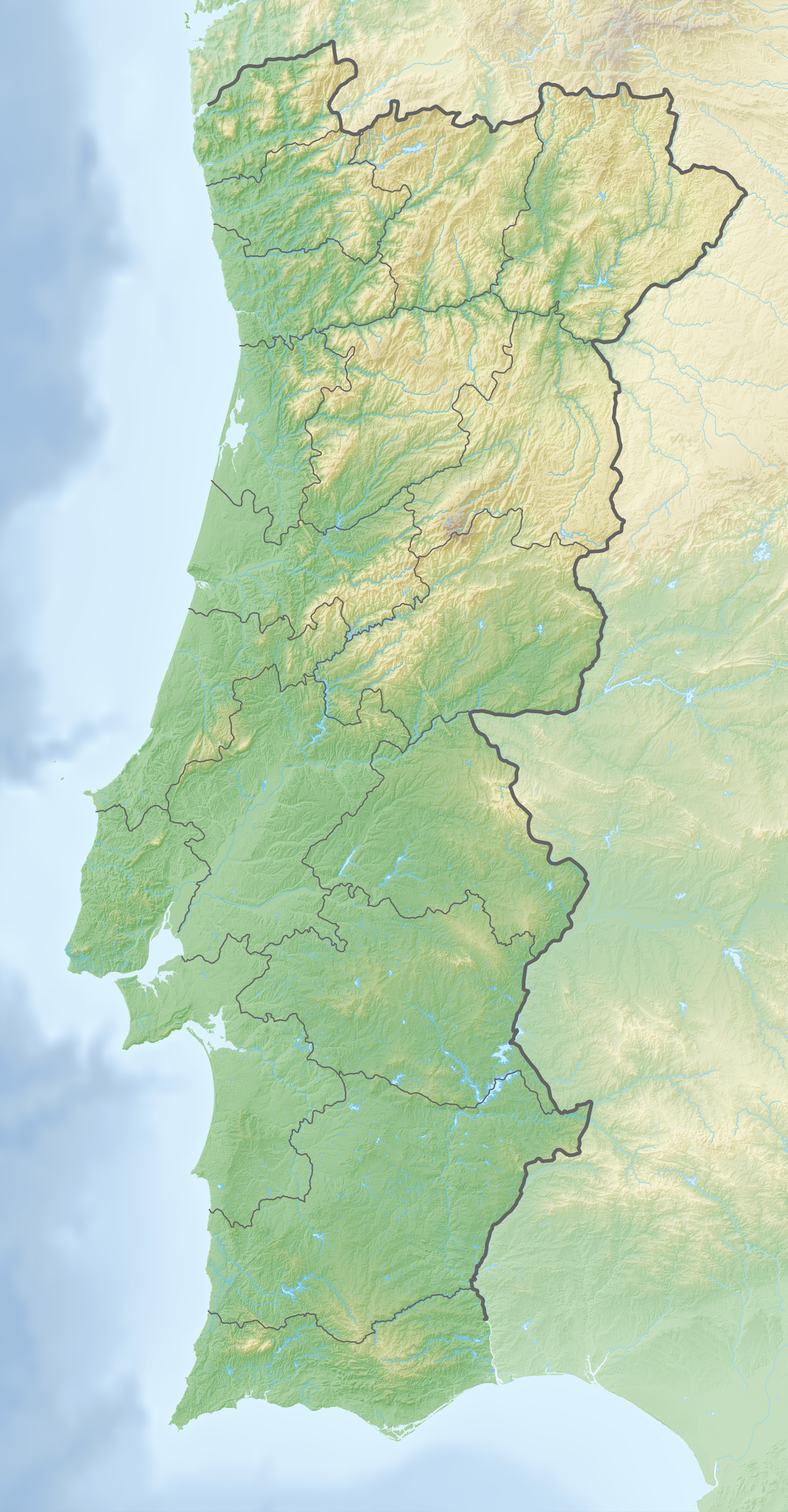 Reliefkarte Portugal Topographischer Hintergrund: NASA Shuttle Radar Topography Mission (public domain). SRTM3 v.2.